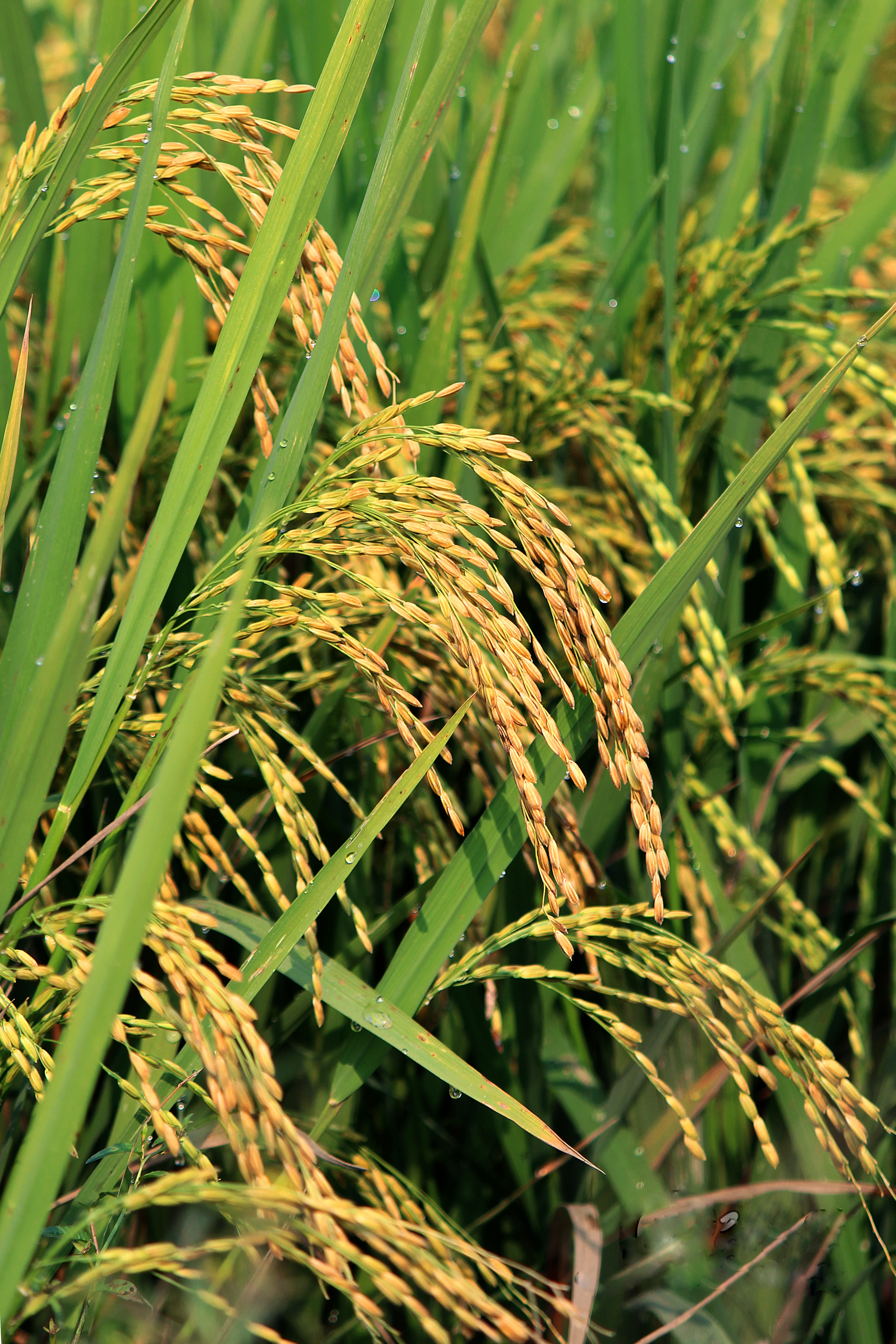 Asian rice (Oryza sativa) നെല്ല്.